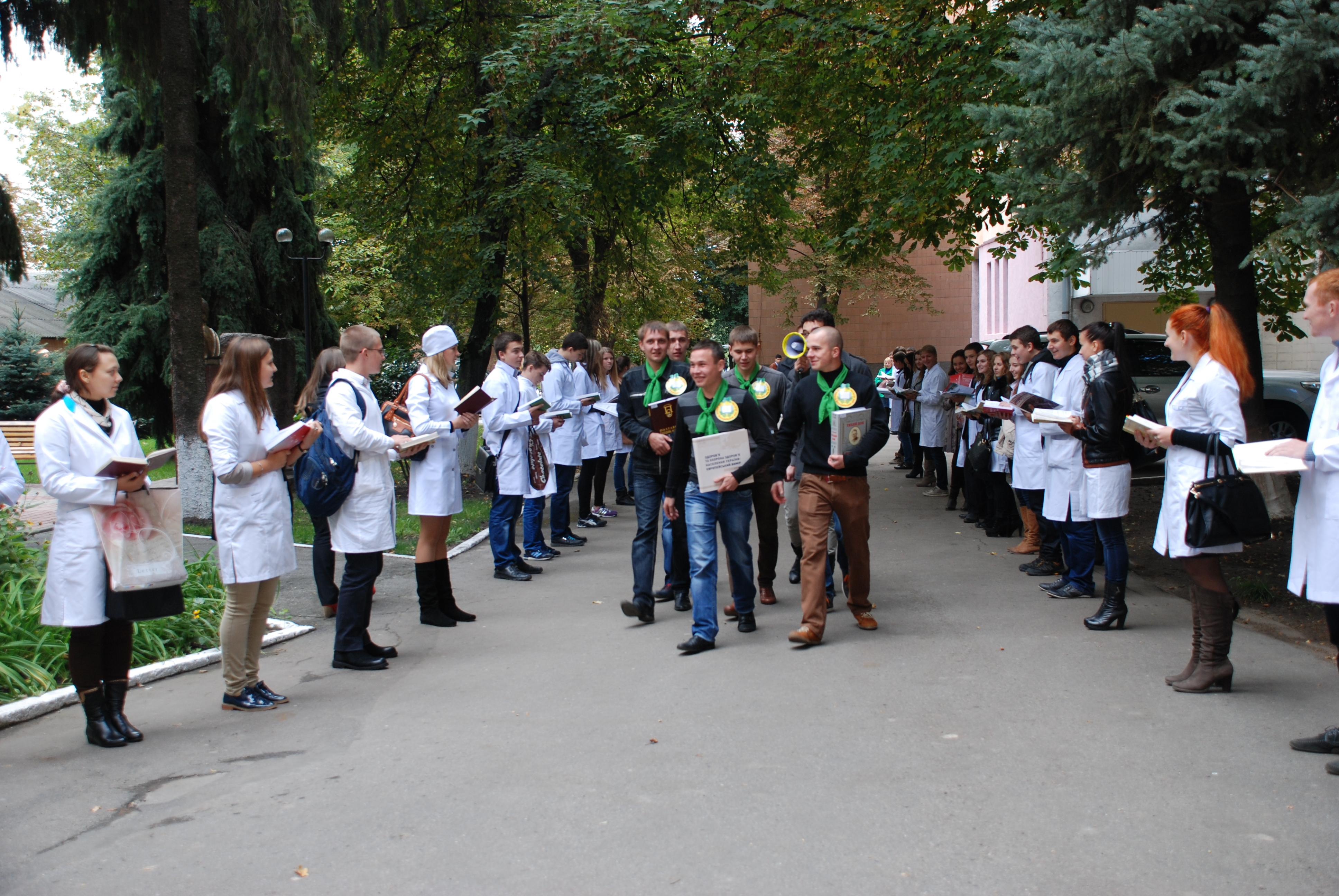 Флешмоб до Всеукраїнського дня бібліотек